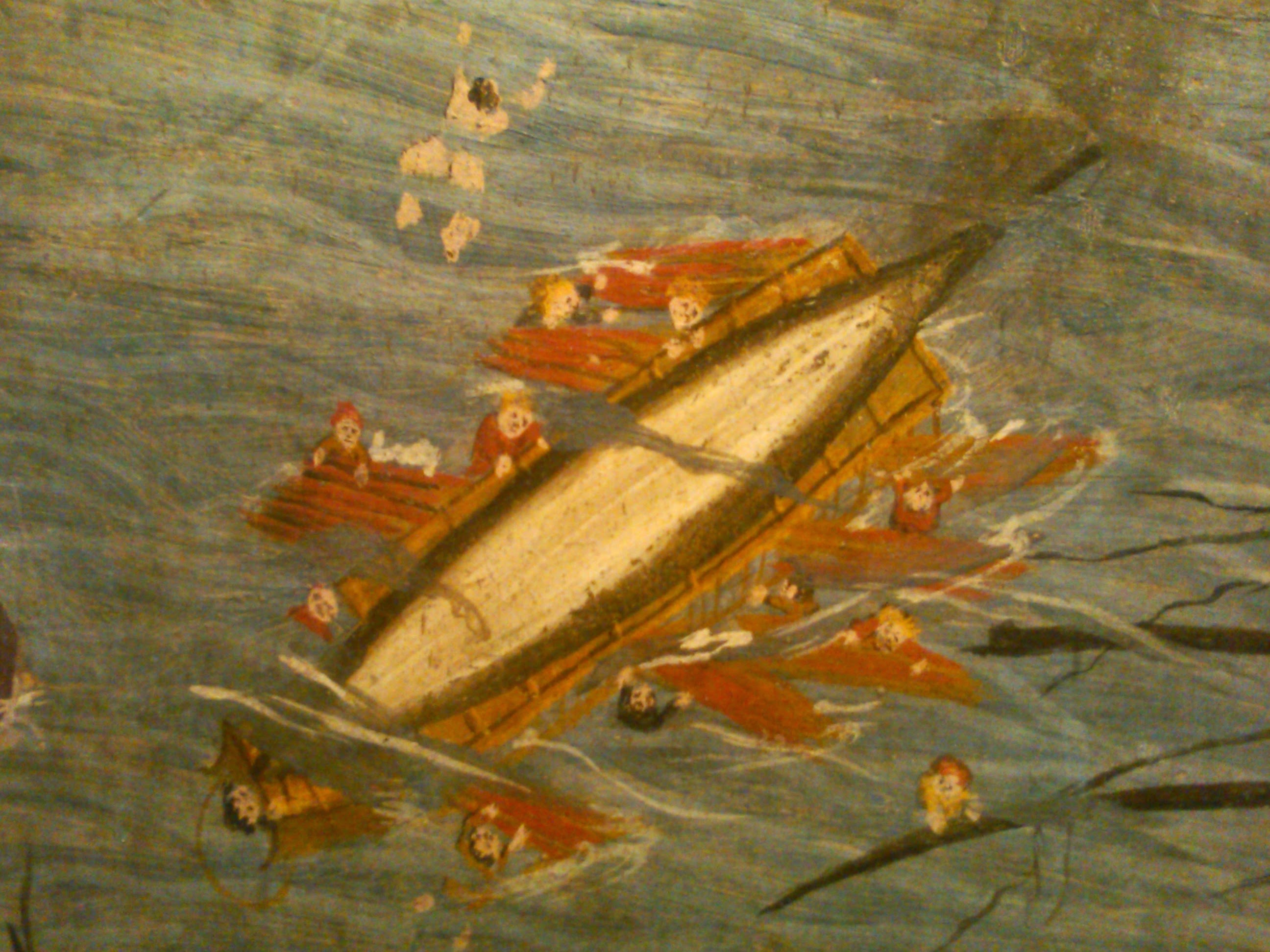 sala della Battaglia di Otranto, di Donato De Cubertino (?). Castello di Capua (Gambatesa). This is a photo of a monument which is part of cultural heritage of Italy.